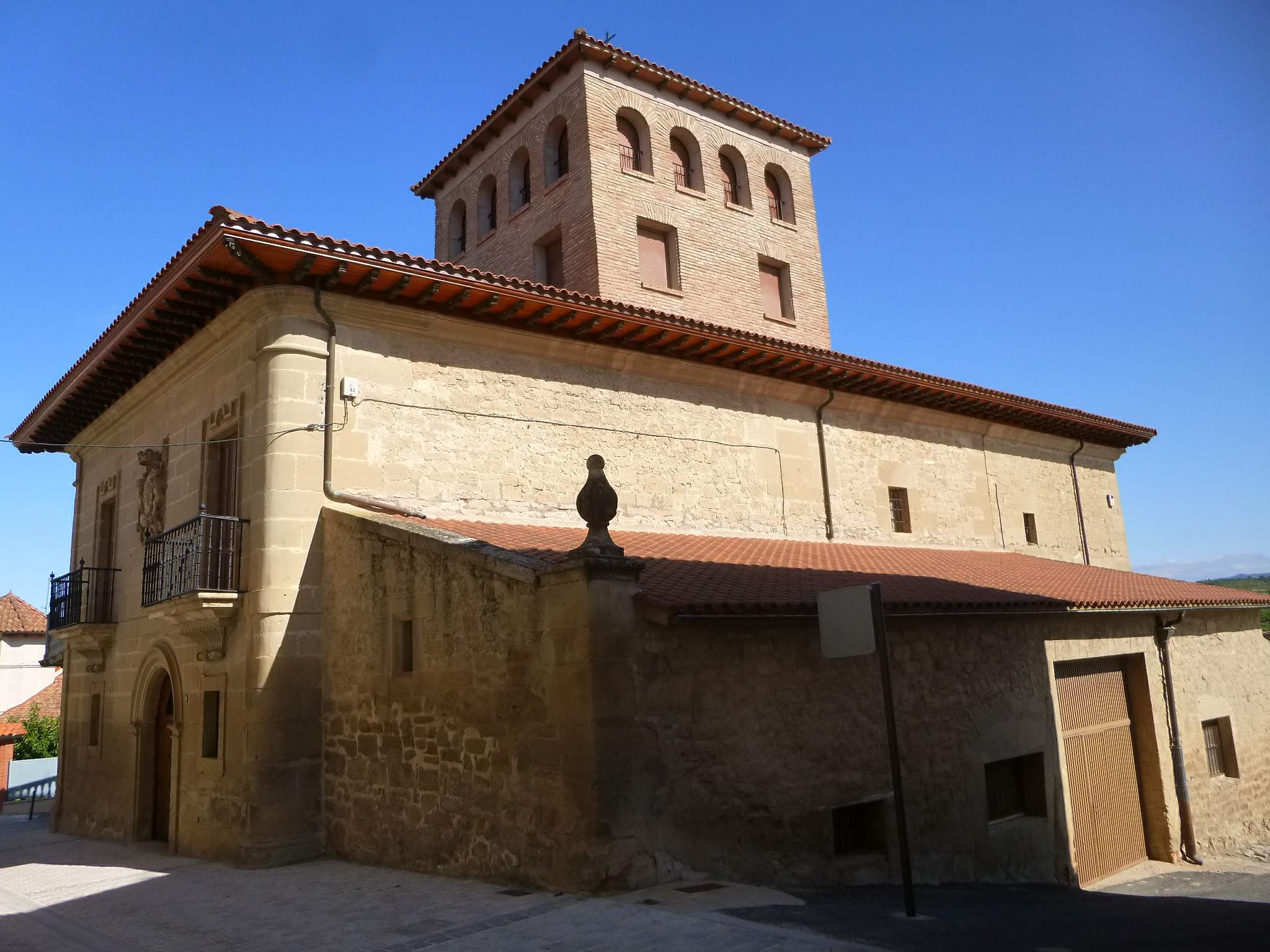 Palacio de los Condes de Bureta (Oyón, Álava)